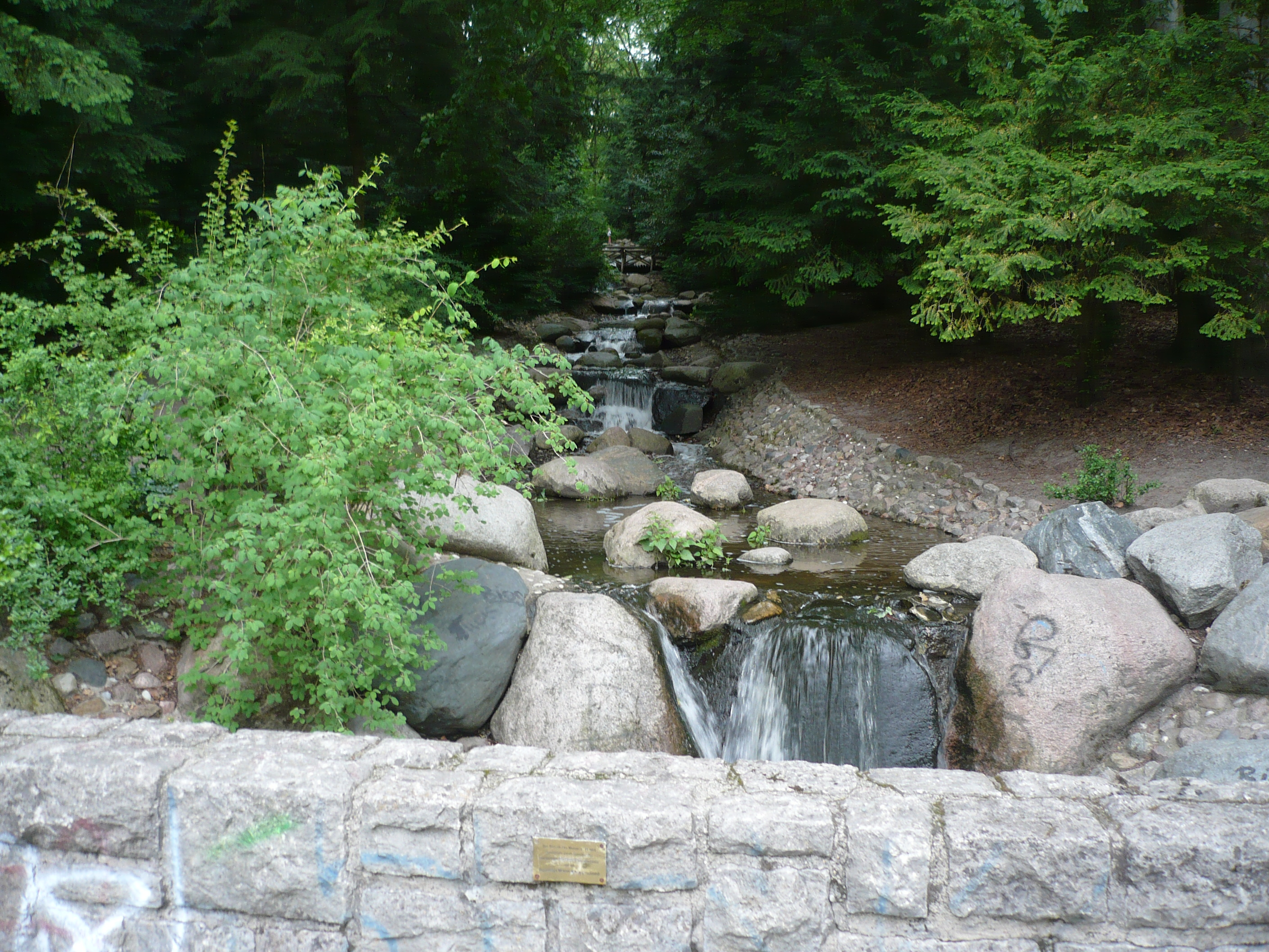 Wasserfall im Steinbergpark, Bezirk Reinickendorf, Berlin